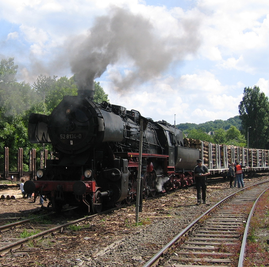 Bahnhof in Hemer. Sonderfahrt der Dampflokomotive 52 8134-0 der Deutschen Reichsbahn zum von Abtransport Kyrill-Holz von Hemer nach Menden. Fahrzeugdaten: Güterzugdampflokomotive der Eisenbahnfreunde Betzdorf seit Mai 1997; Typ: 1’Eh 2, Hersteller: WLF, Fabriknummer: 16591, Baujahr: 1943, ex DR, ex DB AG (Bw Berlin-Schöneweide), ex privat, Celle (Bw Staßfurt), reko. 1964 aus 52 7138.